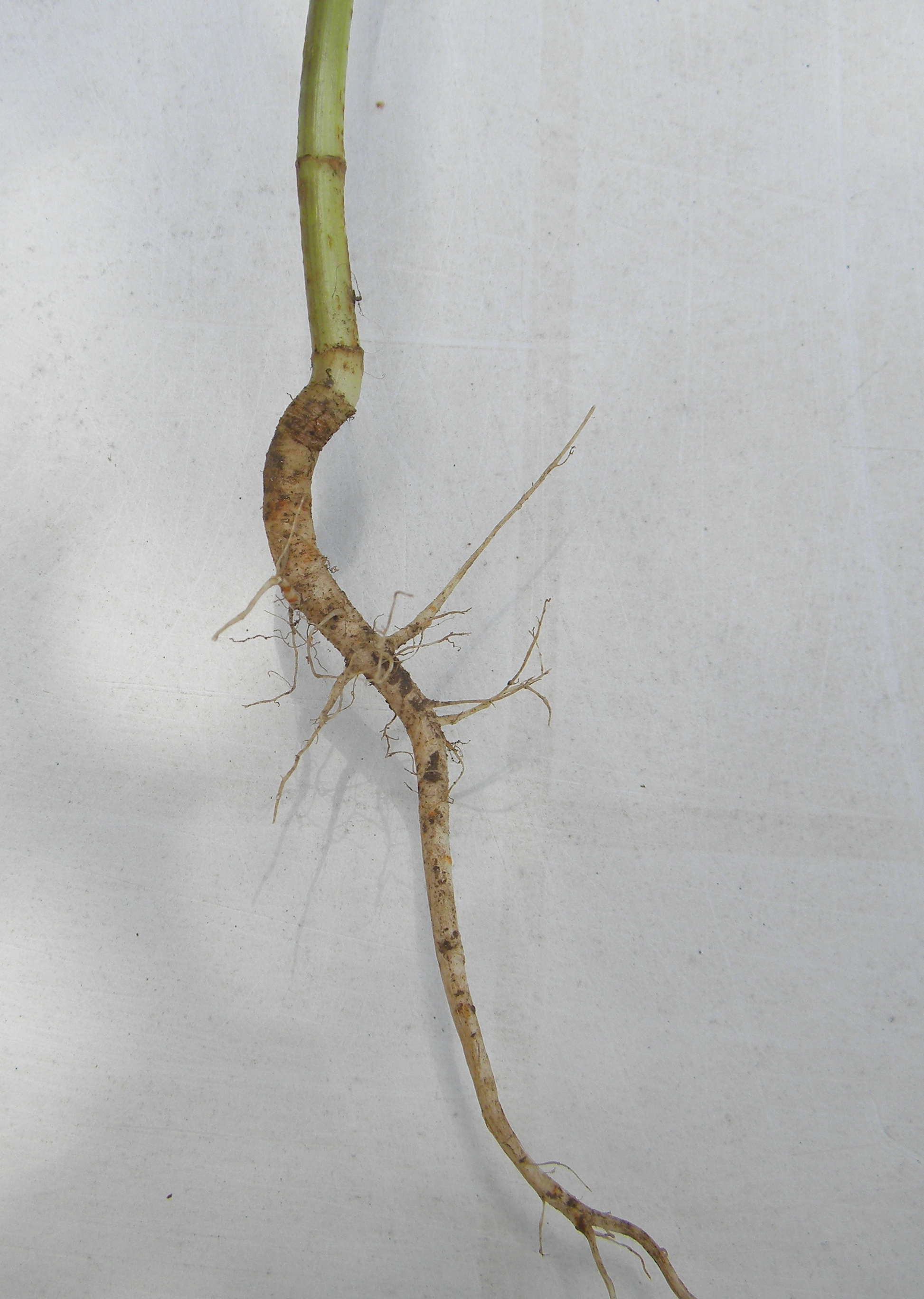 Racine de Torilis arvensis